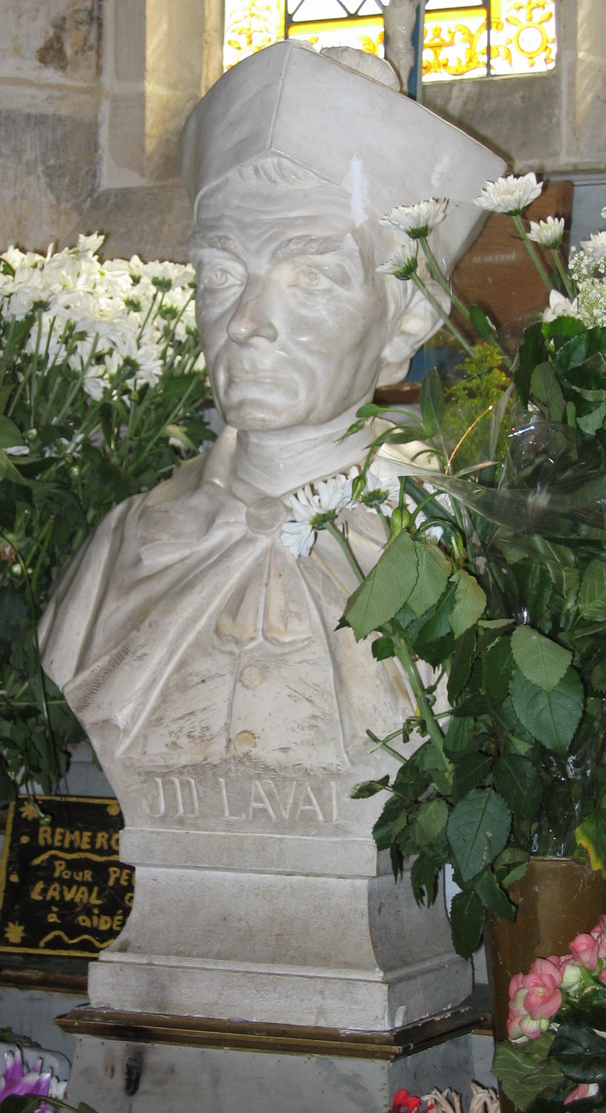 Buste du Père Laval, à Pinterville. Auteur : Benoît Smerecki (sblaval). Cette photo peut être utilisée librement.